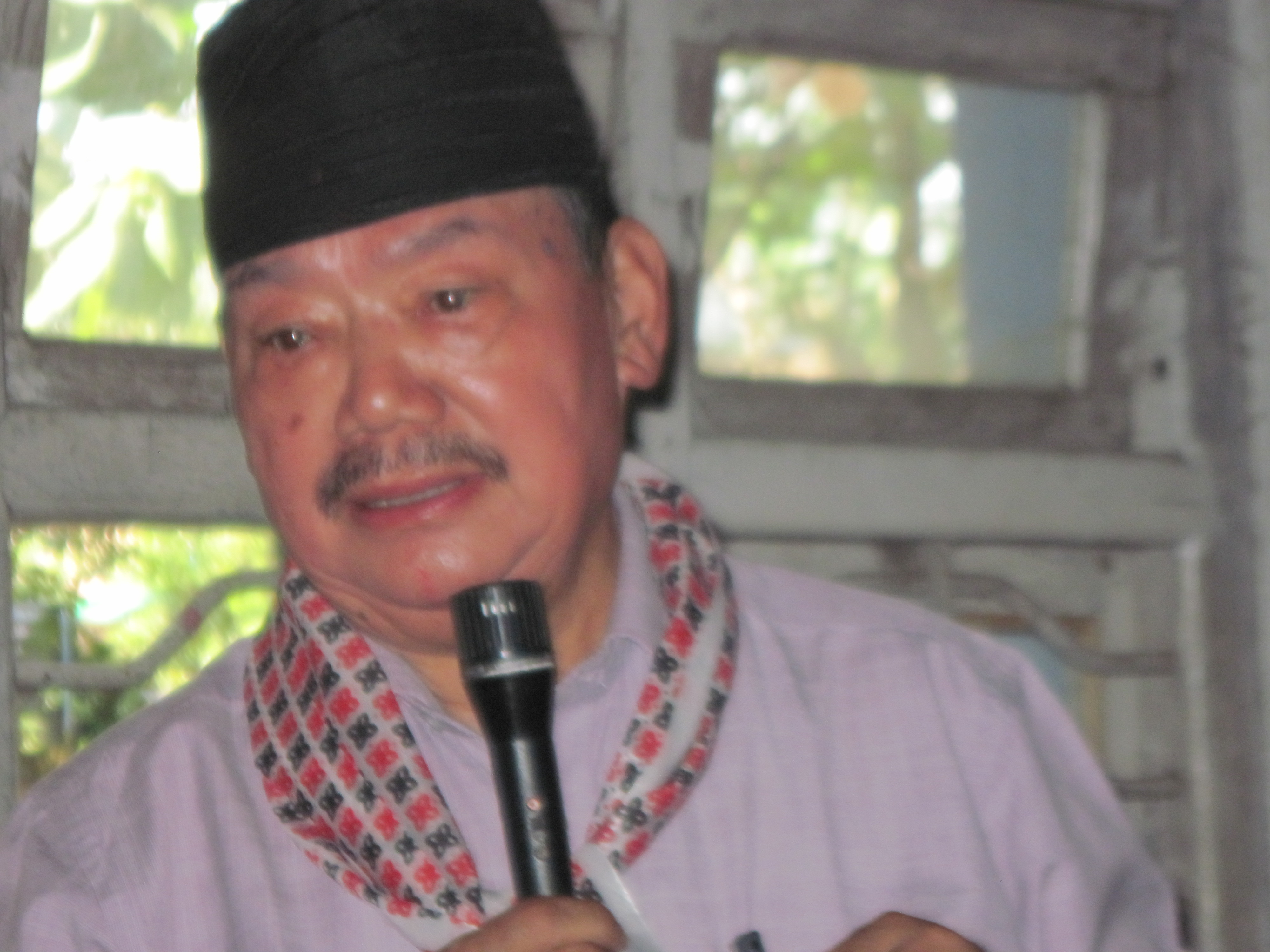 नेपाली: श्यामकृष्ण पत्रकारिता पुरस्कार गुठीद्वारा झापाका जेठा पत्रकार श्यामकृष्ण उपाध्यायका स्मृतिमा स्थापित पत्रकारिता पुरस्कार २०७१ वितरण समाराेह । स्थान रत्न मेमाेरियल हल विर्तामाेड, झापा । मिति- २०७१।०७। ०४ चित्र : प्रमुख अतिथि गणेश रसिक (सचिव, नाट्यकला प्रज्ञा प्रतिष्ठान, काठमाडाैं